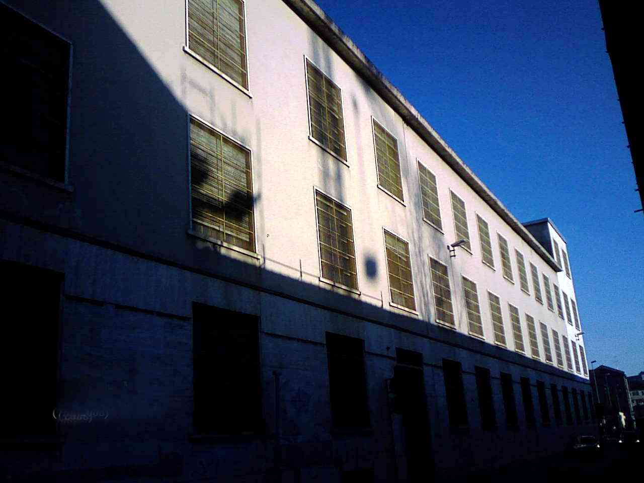 Monza ex fabbrica CGS (acronimo di Centimetro-Grammo-Secondo) in via Marsala dirimpetto alla ex Ditta Alfredo Zopfi, poi SAML